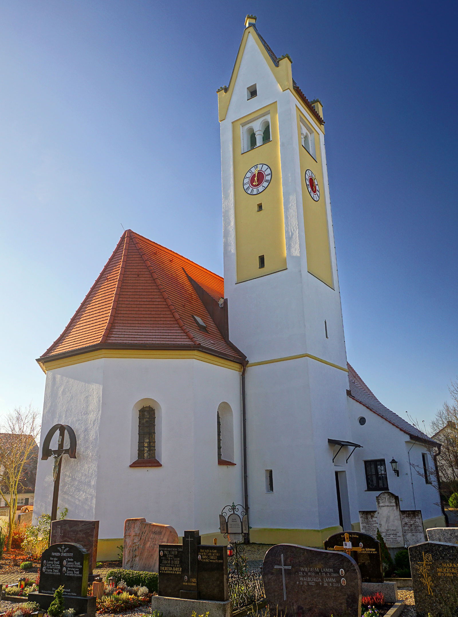 Walkertshofen Kirche